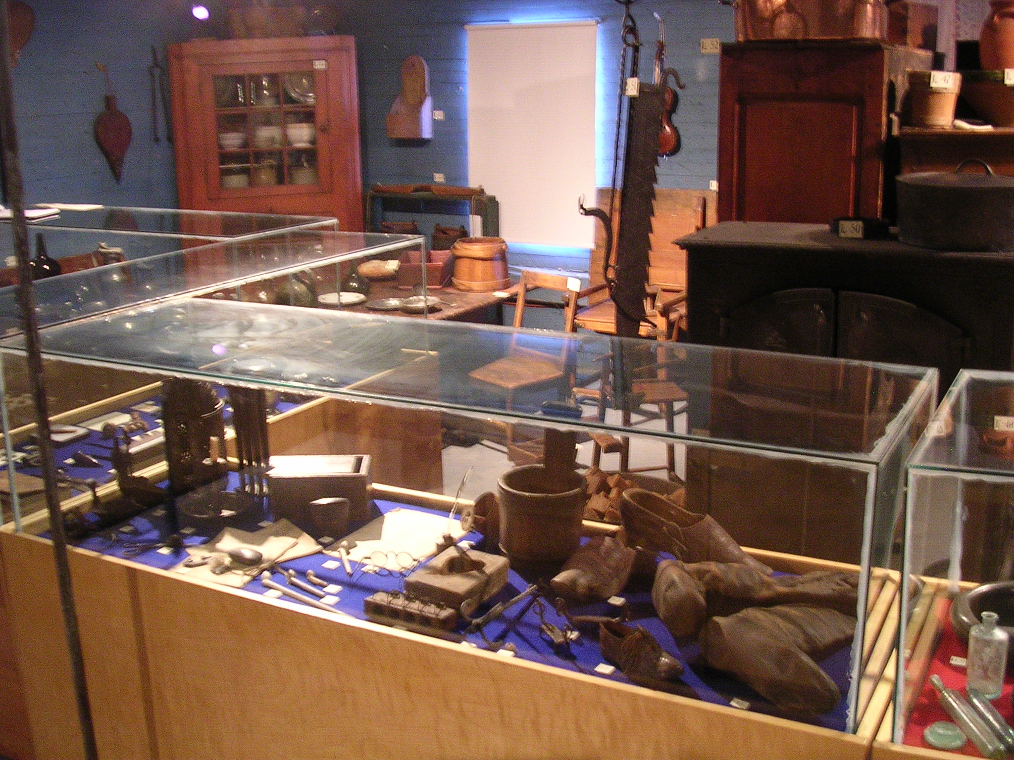 Une partie de l'exposition du Musée de Neufve-France situé à l'étage du Vieux moulin de Sainte-Flavie (Bas-Saint-Laurent, Québec). Le moulin est maintenant un lieu de production de miel et d'hydromel. Moulin à eau; moulin à farine; abeilles; ruches; Nouvelle-France. La photo est de faible qualité à cause de l'absence de lumière, des limites de l'appareil utilisé et celles du photographe...